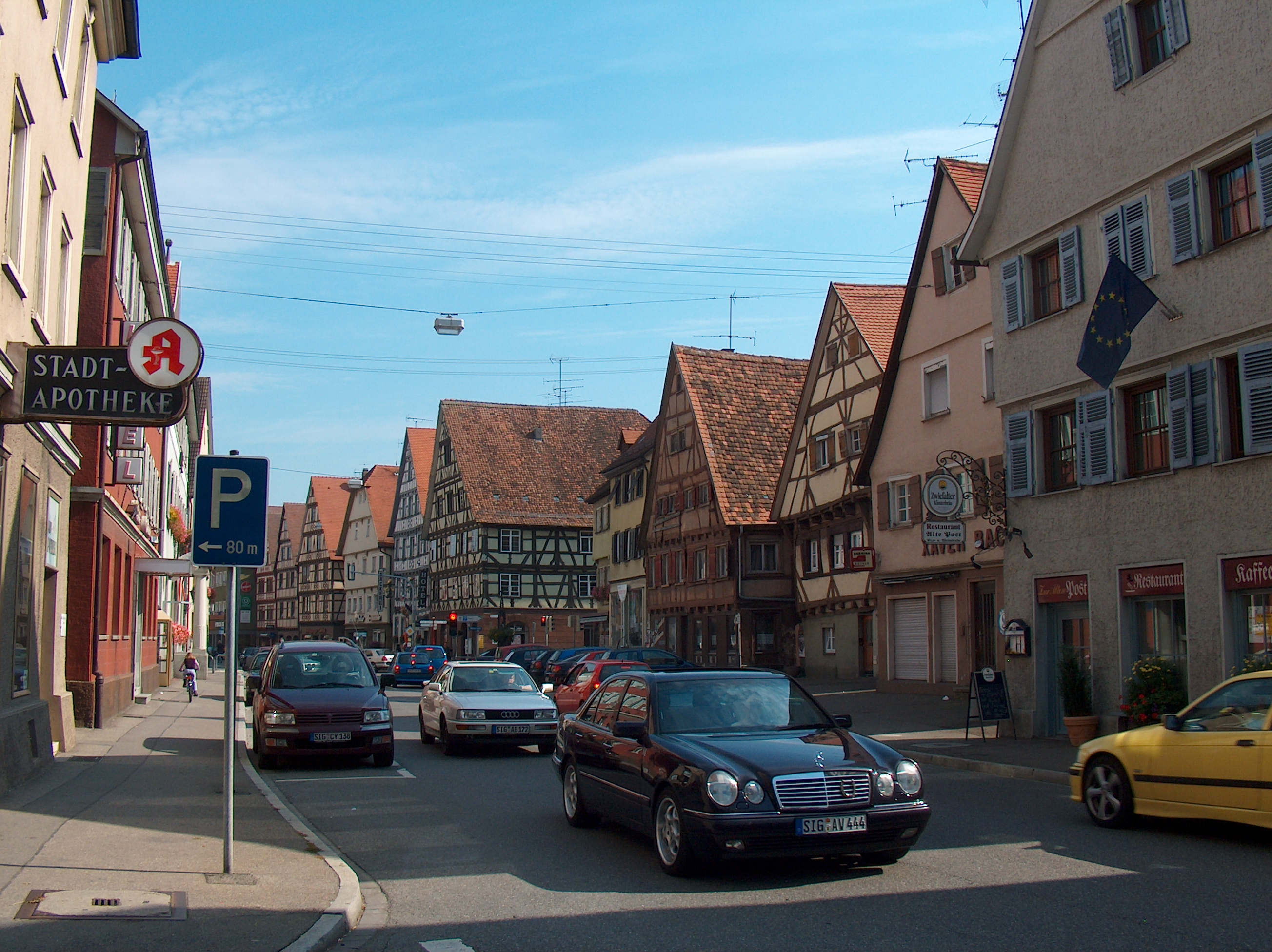 Le photographe: Roland Nonnenmacher - D-72516 Scheer Date de la gÃ©nÃ©ration de donnÃ©es : 22 septembre 2005 Ã